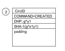 Cécula created en Intercambio de células para el establecimiento de circuito en Tor